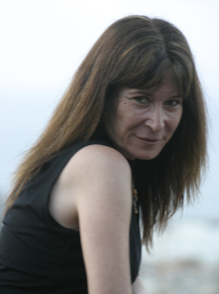 צילום עצמי